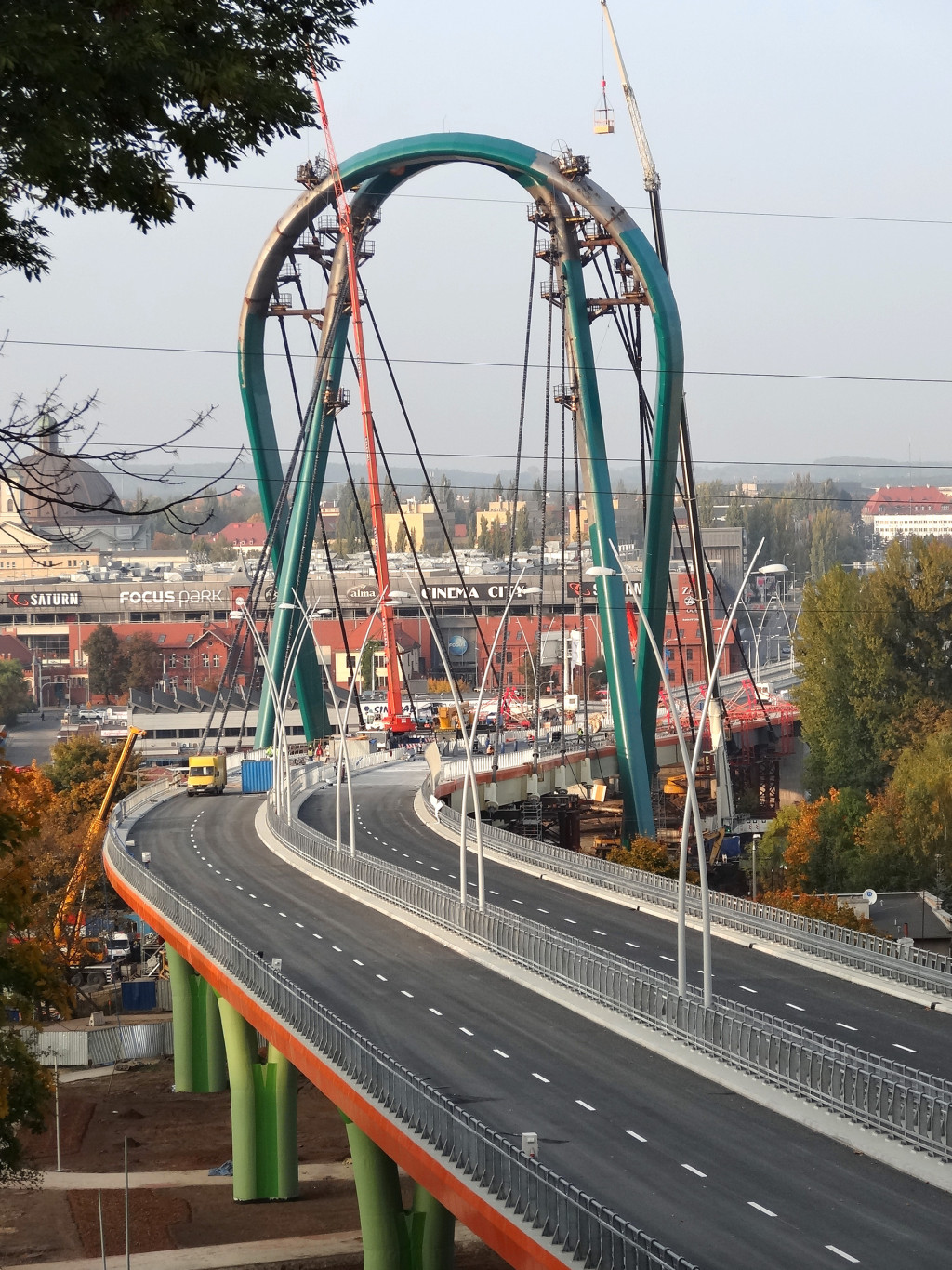 Trasa Uniwersytecka w Bydgoszczy